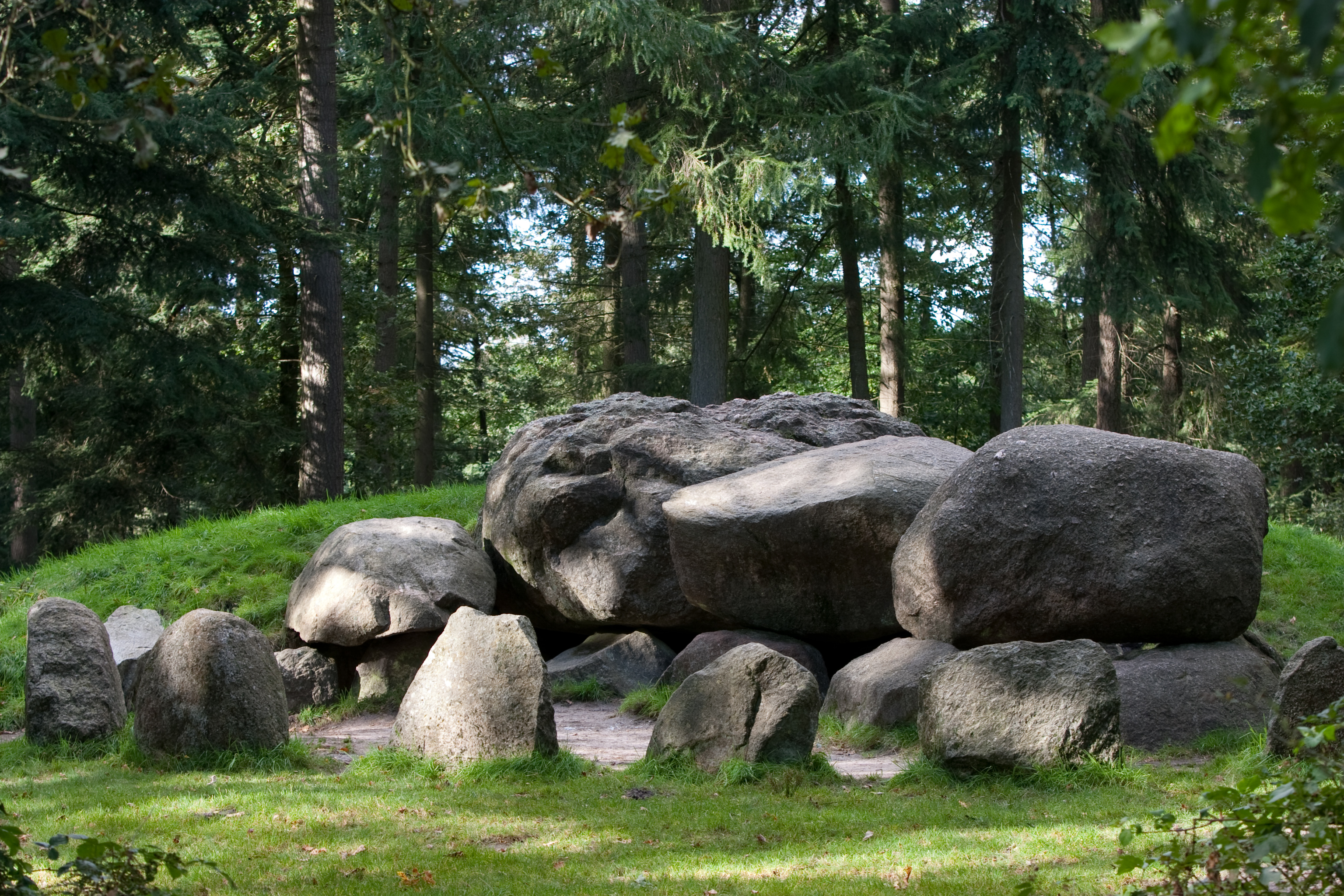 Hunebed D49 "De Papeloze Kerk" bij Schoonoord Drenthe (NL)